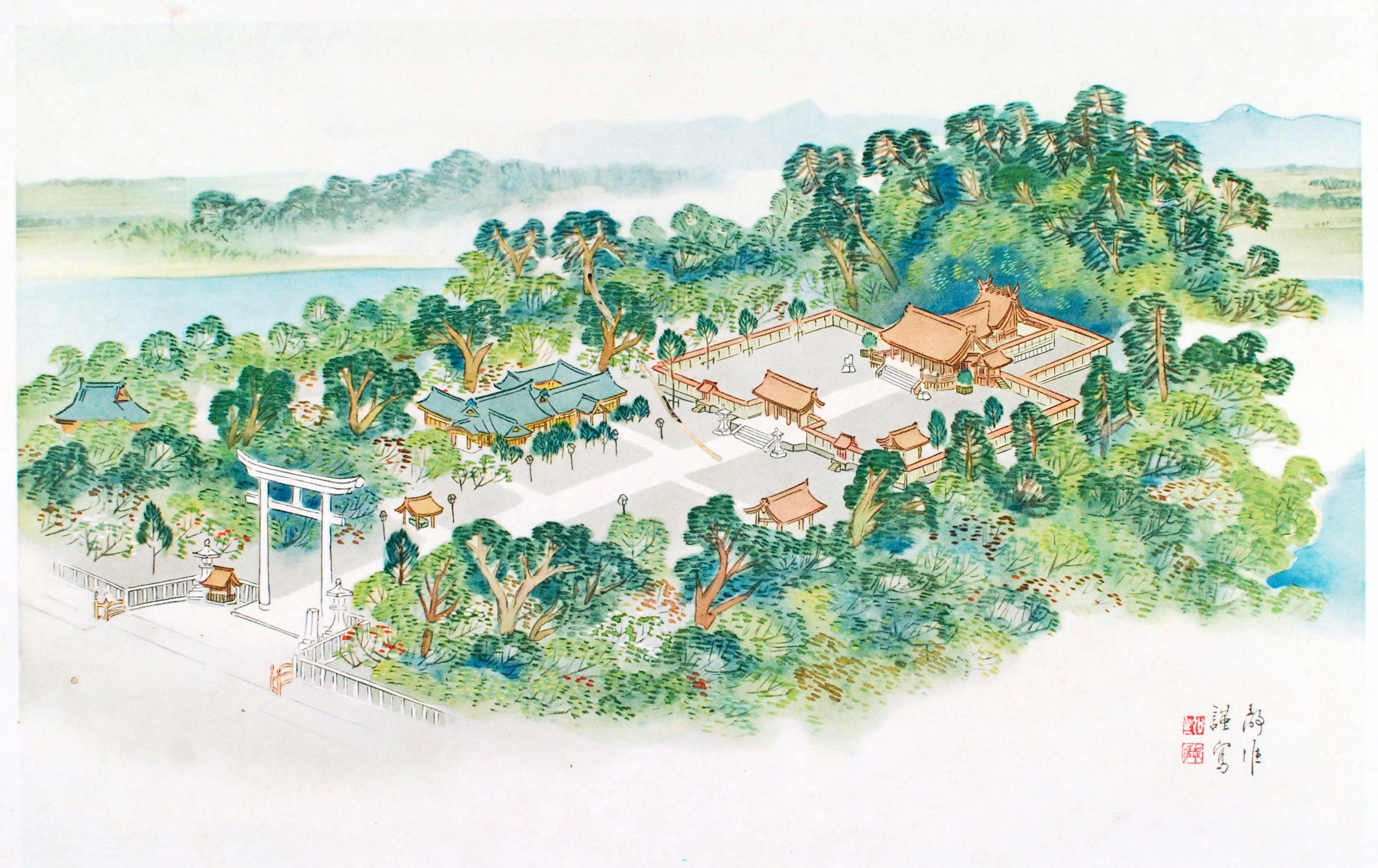 中文（台灣）: 台中神社全景圖